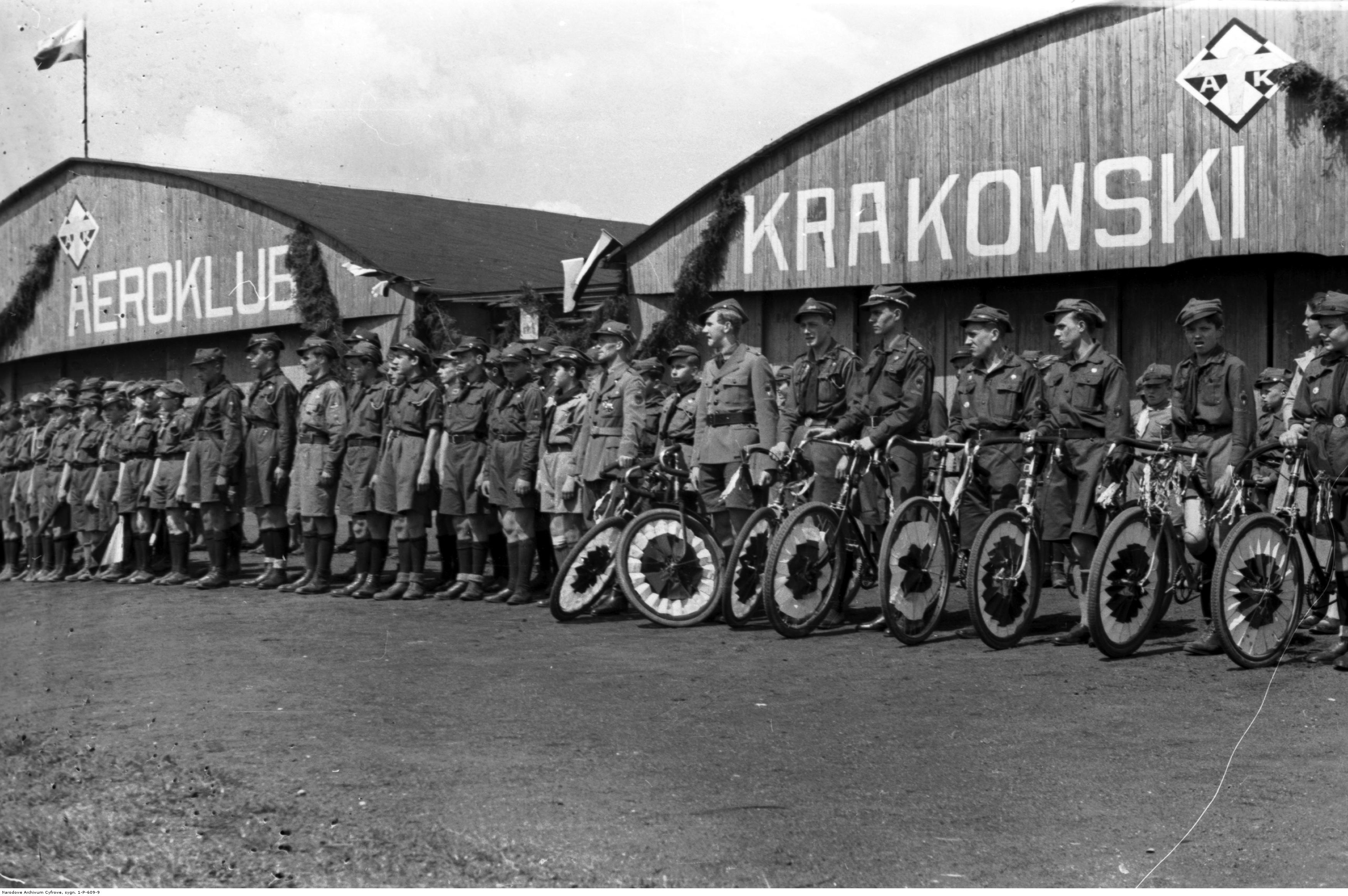 Sekcja cyklistów z udekorowanymi rowerami przed hangarem Aeroklubu Krakowskiego na lotnisku Rakowickim.